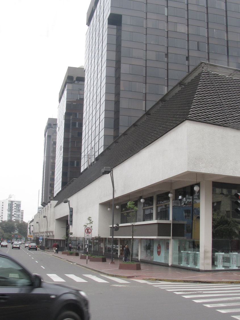 Entrada al Centro Comercial Camino Real, en el Distrito de San Isidro, Lima, Perú.